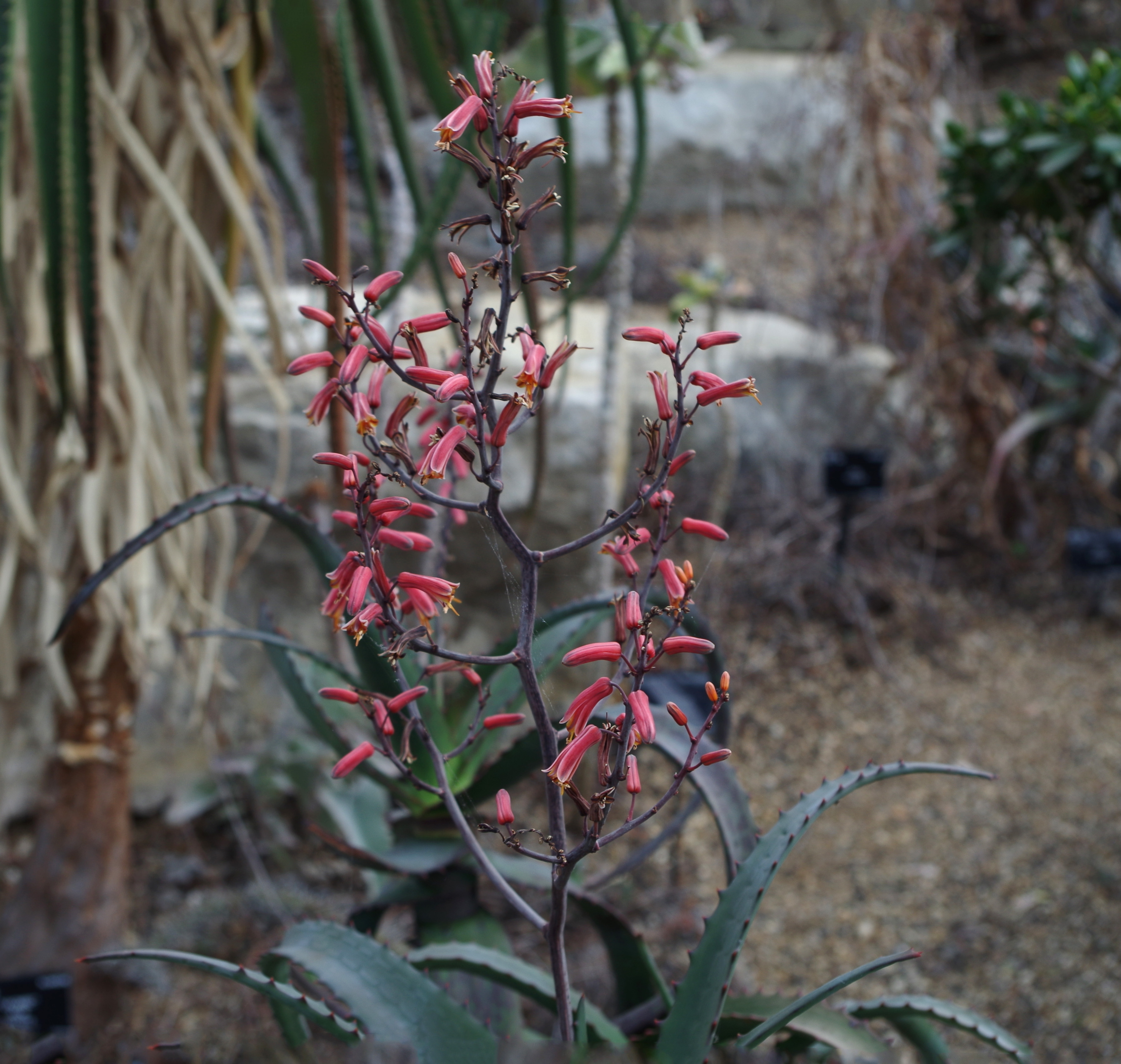 Aloe divaricata - Kew Gardens